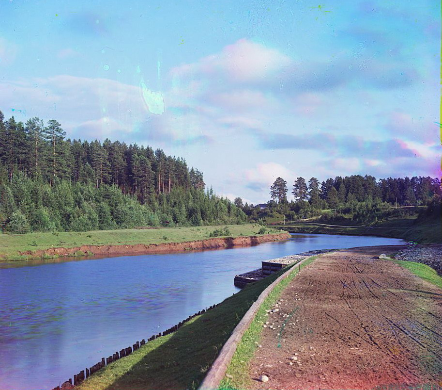 На реке Вытегре. Мариинская водная система. Фотография С.М. Прокудина-Горского. 1909 г.